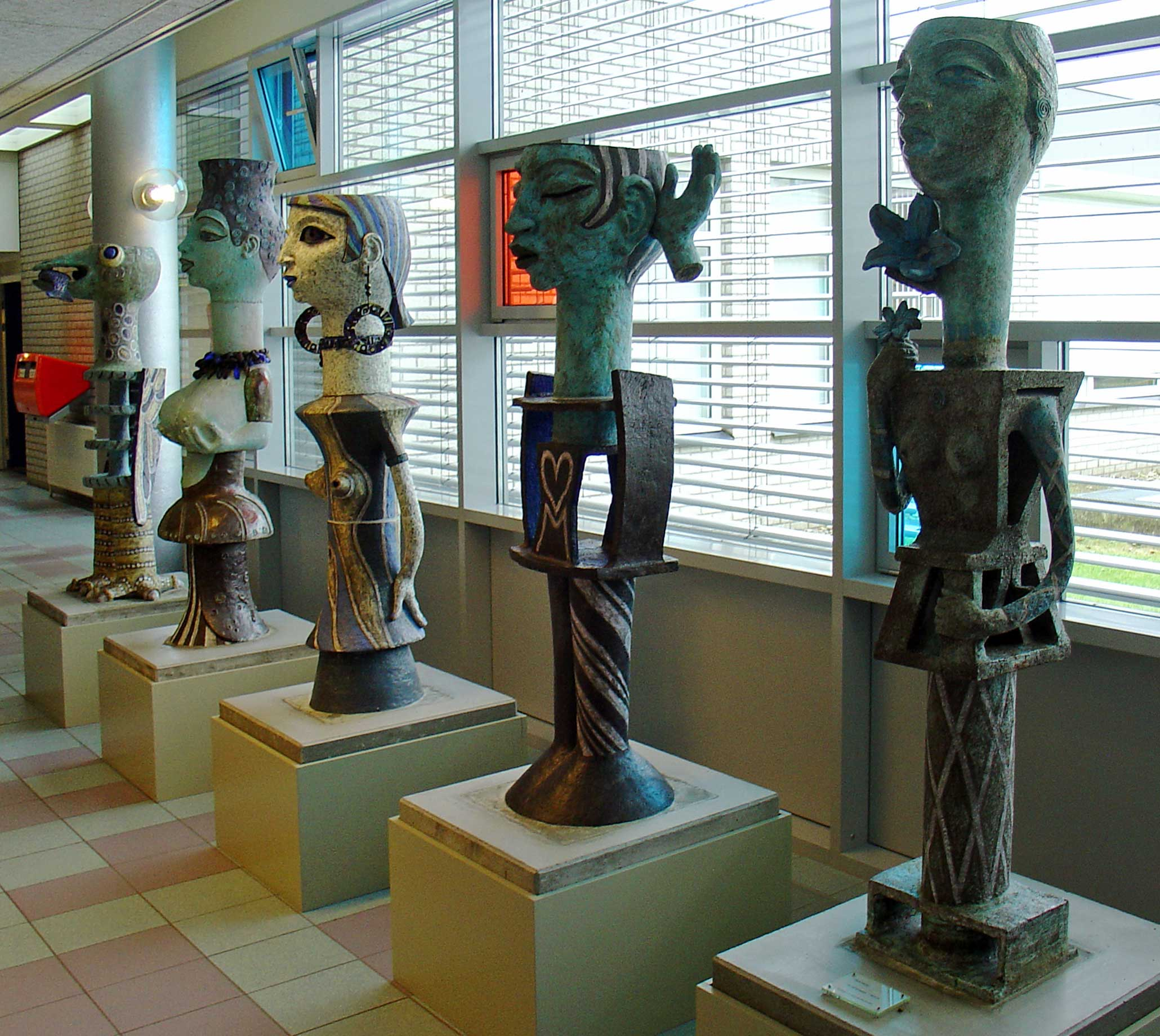 De vijf zintuigen door Hans Ittmann - het Scheperziekenhuis te Emmen